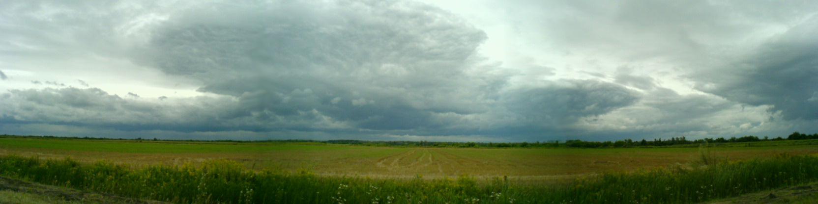 Slavonia just before rain